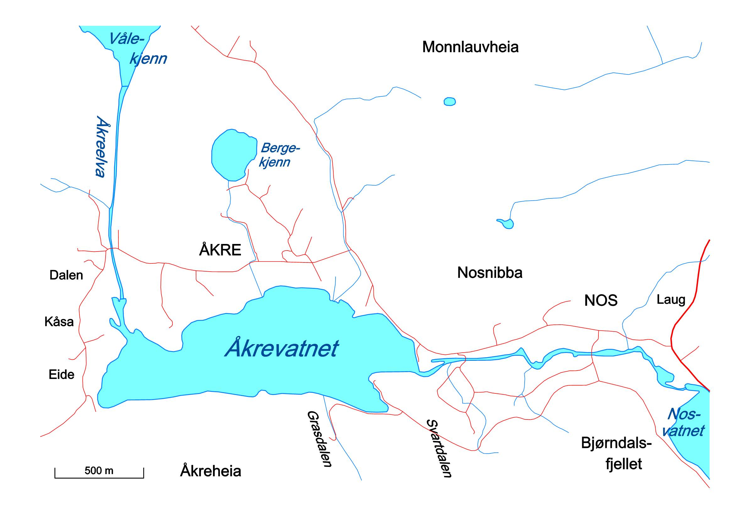 Kart Åkrevatnet Drangedal, Telemark, Norway